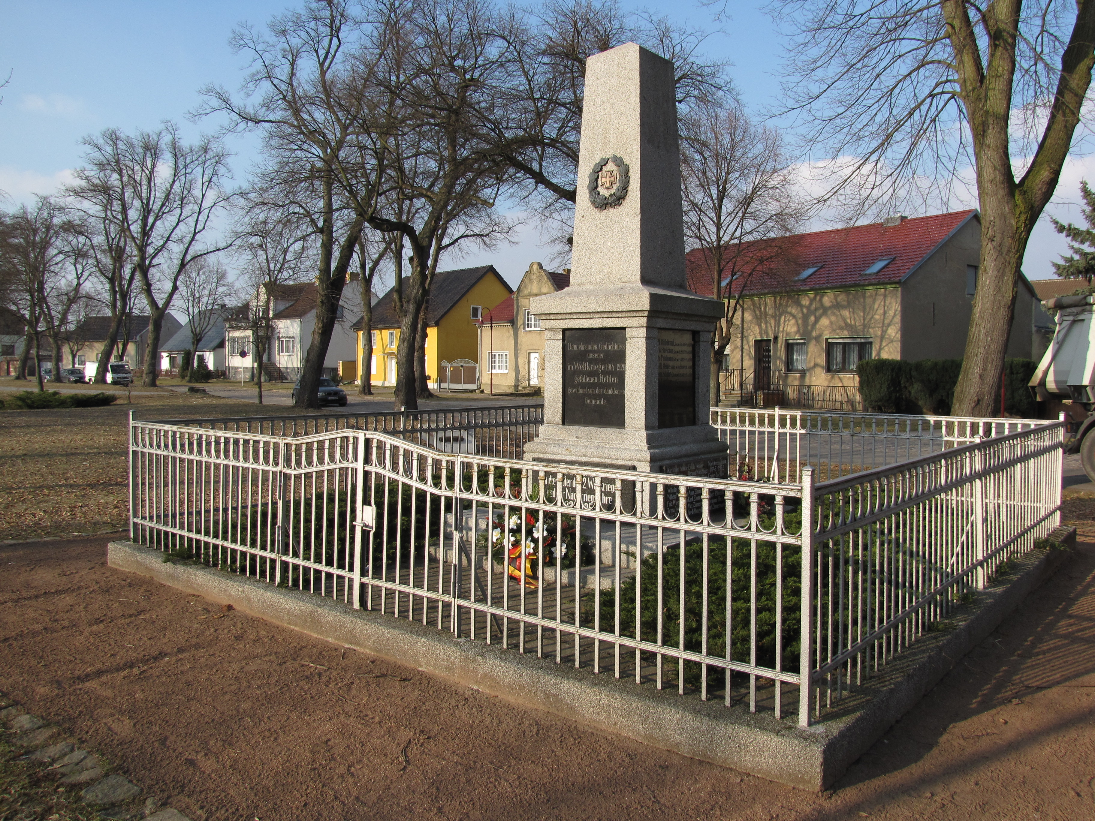 Kriegerdenkmal in Schöneiche, Stadt Zossen, Brandenburg, Deutschland